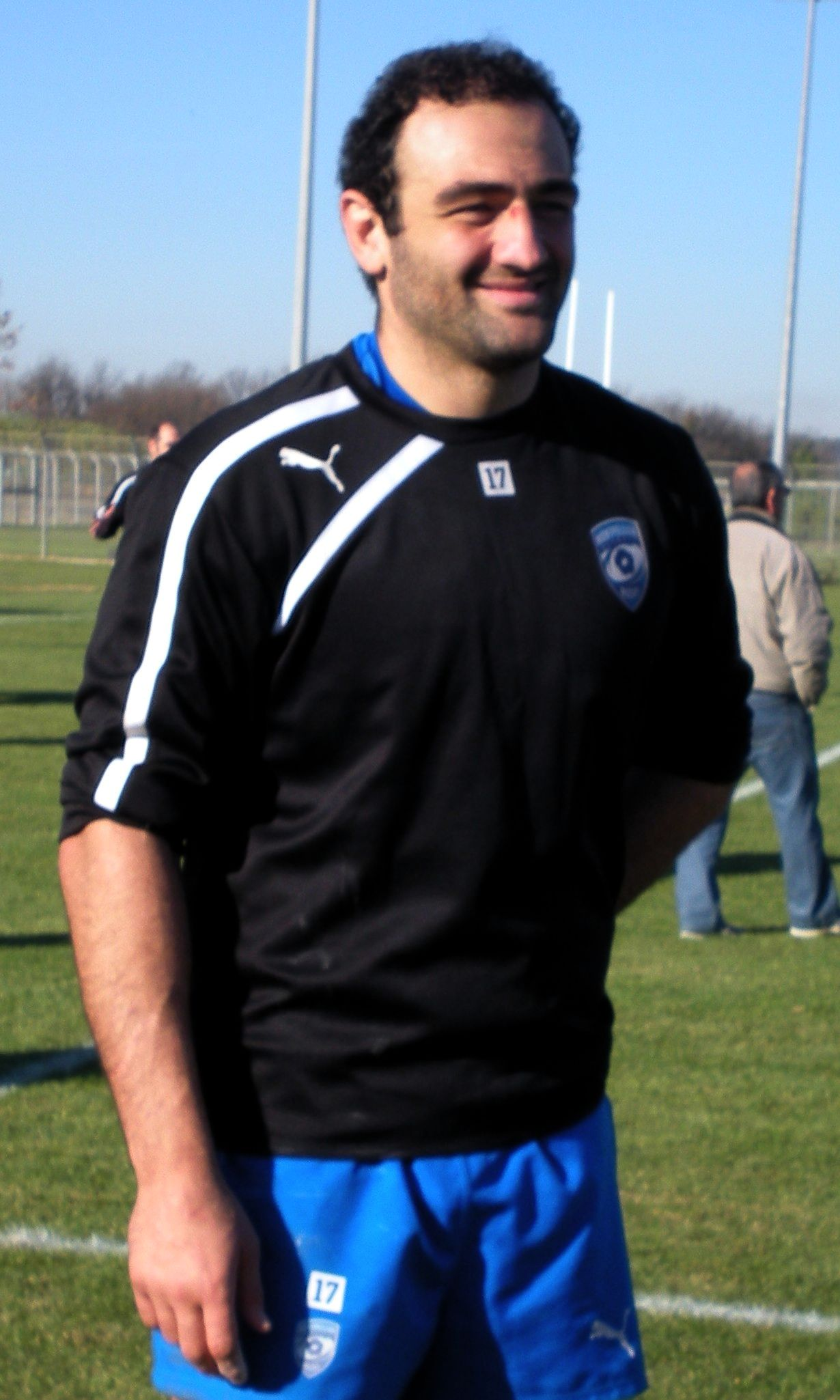 Mamuka Gorgodze, fin d’entraînement, décembre 2013.